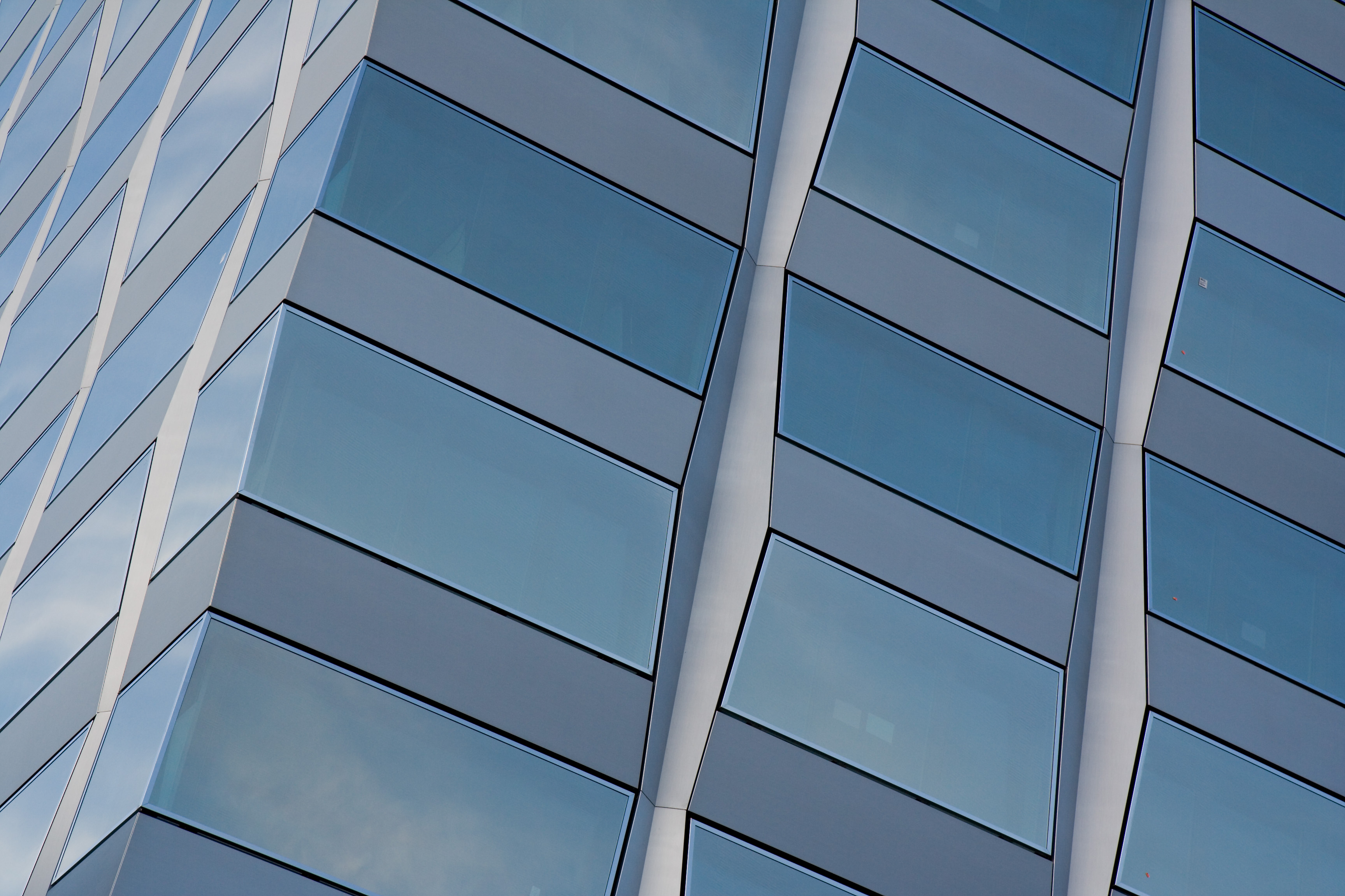 Die Fassade des SIA-Hochhauses an der Selnaustr. 16, Zürich, SchweizZustand nach der grossen Renovation.